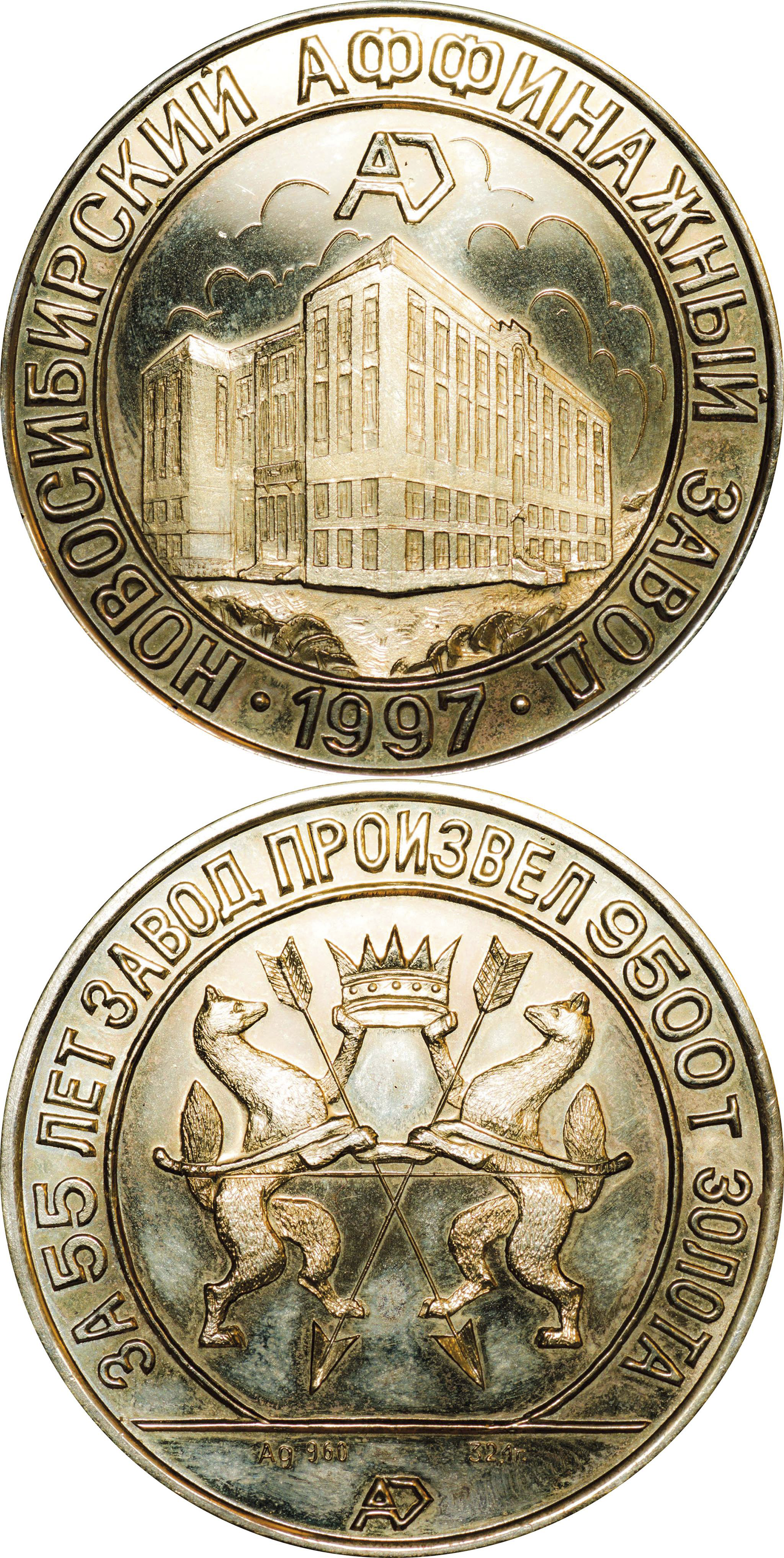 Фото сувенирной продукции Новосибирского аффинажного завода